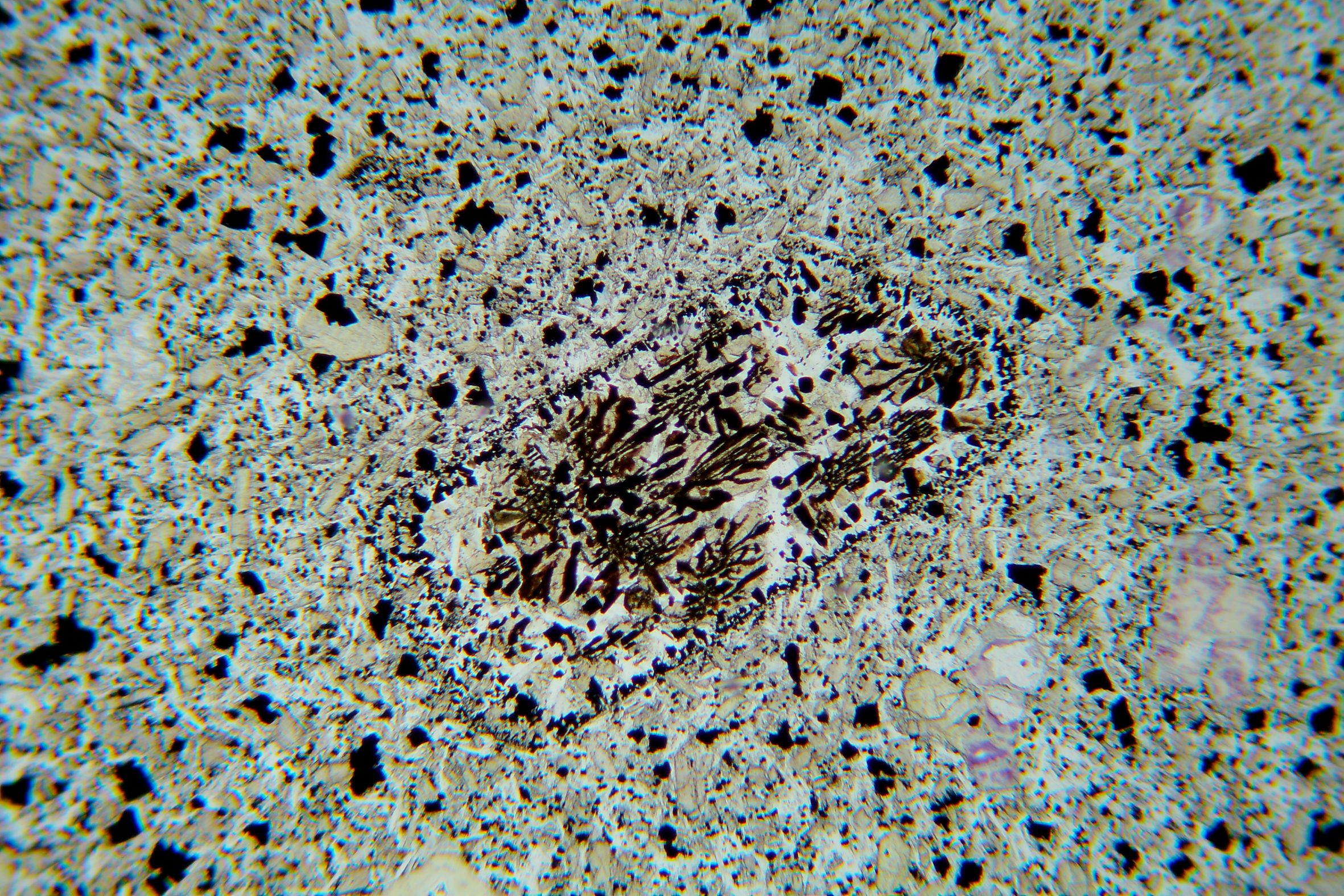 Vollständig opacitisierter, ehemaliger Hornblendekristall mit erhaltenem Umriß. Dunkelbraun = Rhönit; hellbraun = Augit; klar = Plagioklas; schwarz = Magnetit.